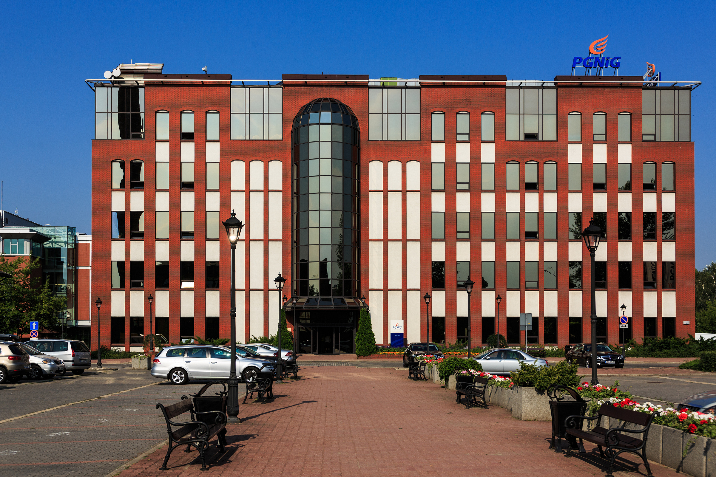 Budynek siedziby głównej PGNiG w Warszawie, ul. Kasprzaka